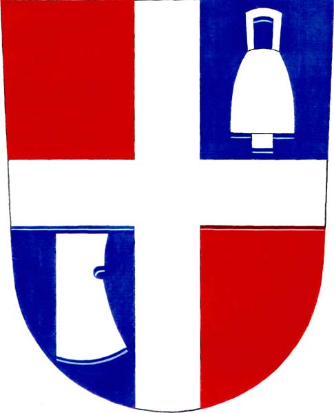 Znak obce Rusava